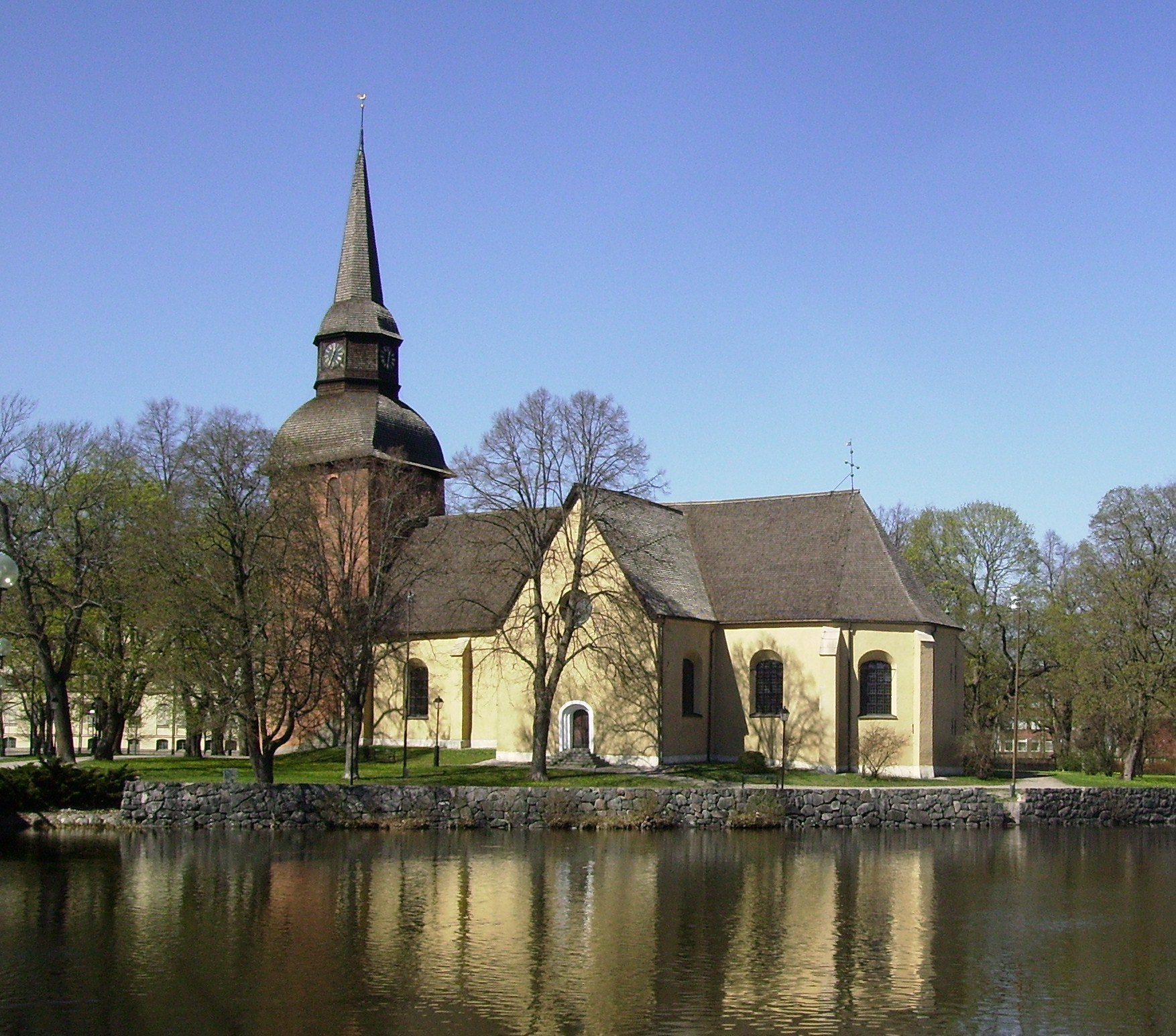 Picture of Fors kyrka, a church in Eskilstuna, Södermanlands län.